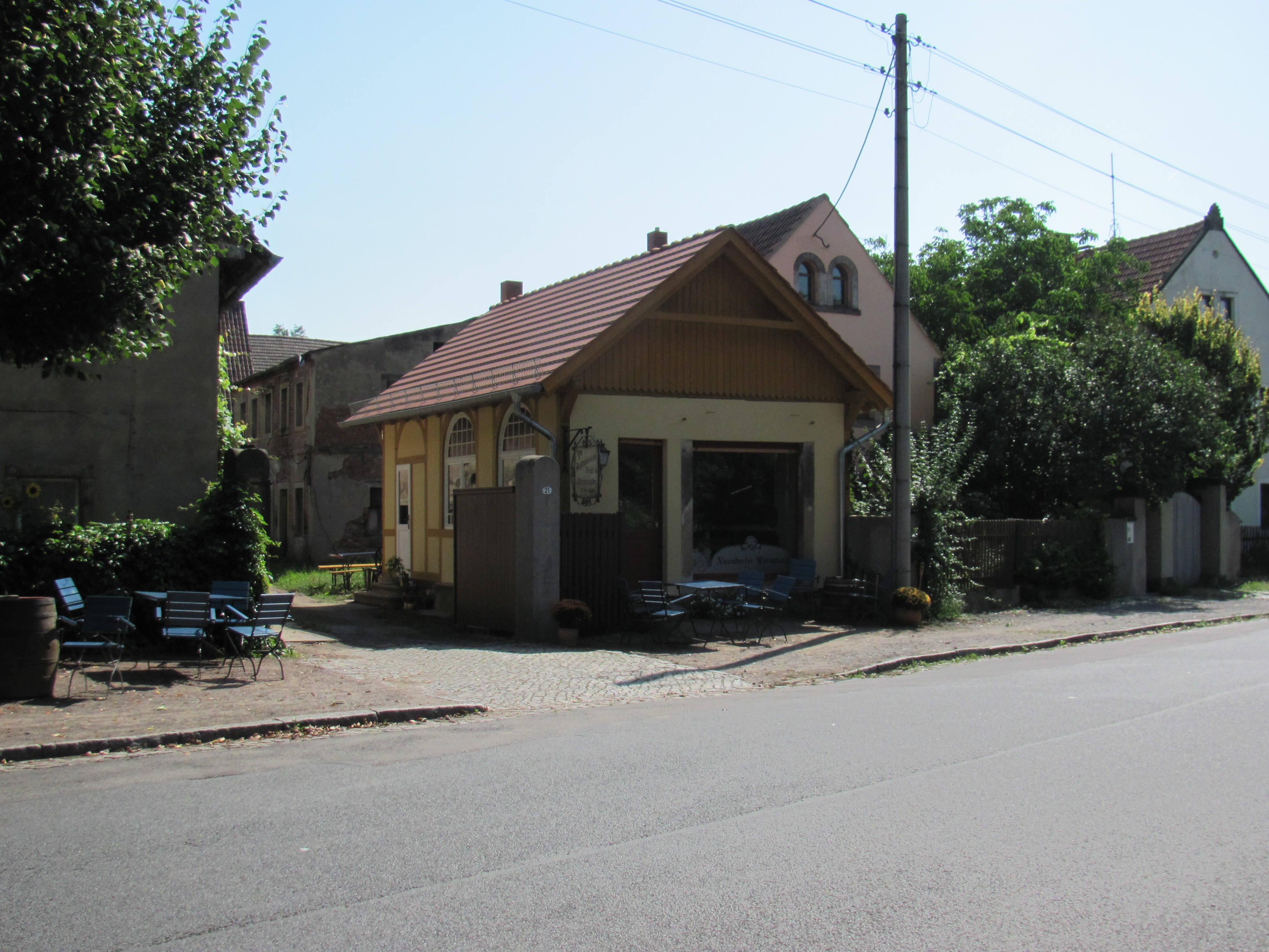 Radebeul-Naundorf Trinkbude